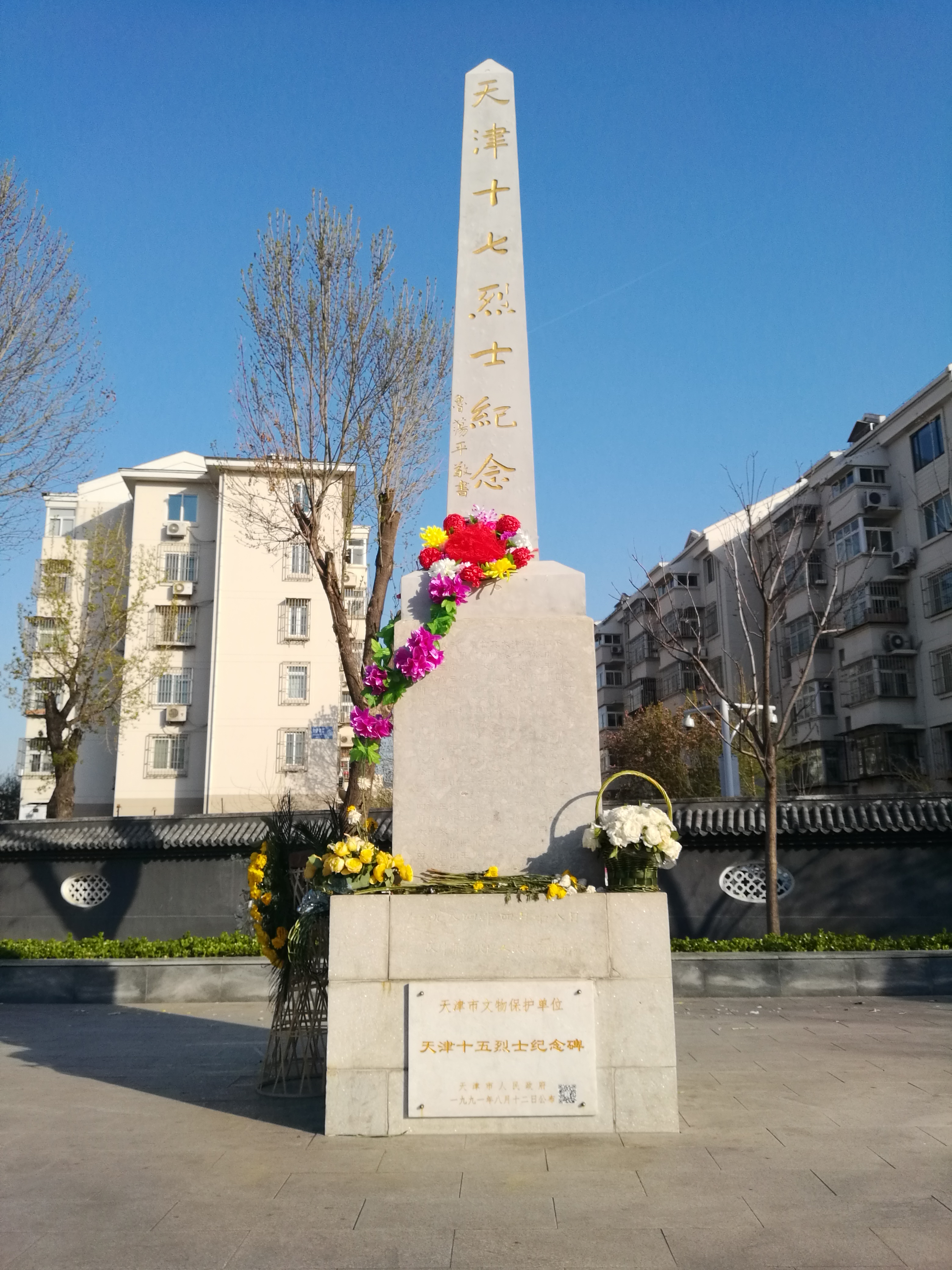 天津十七烈士纪念碑